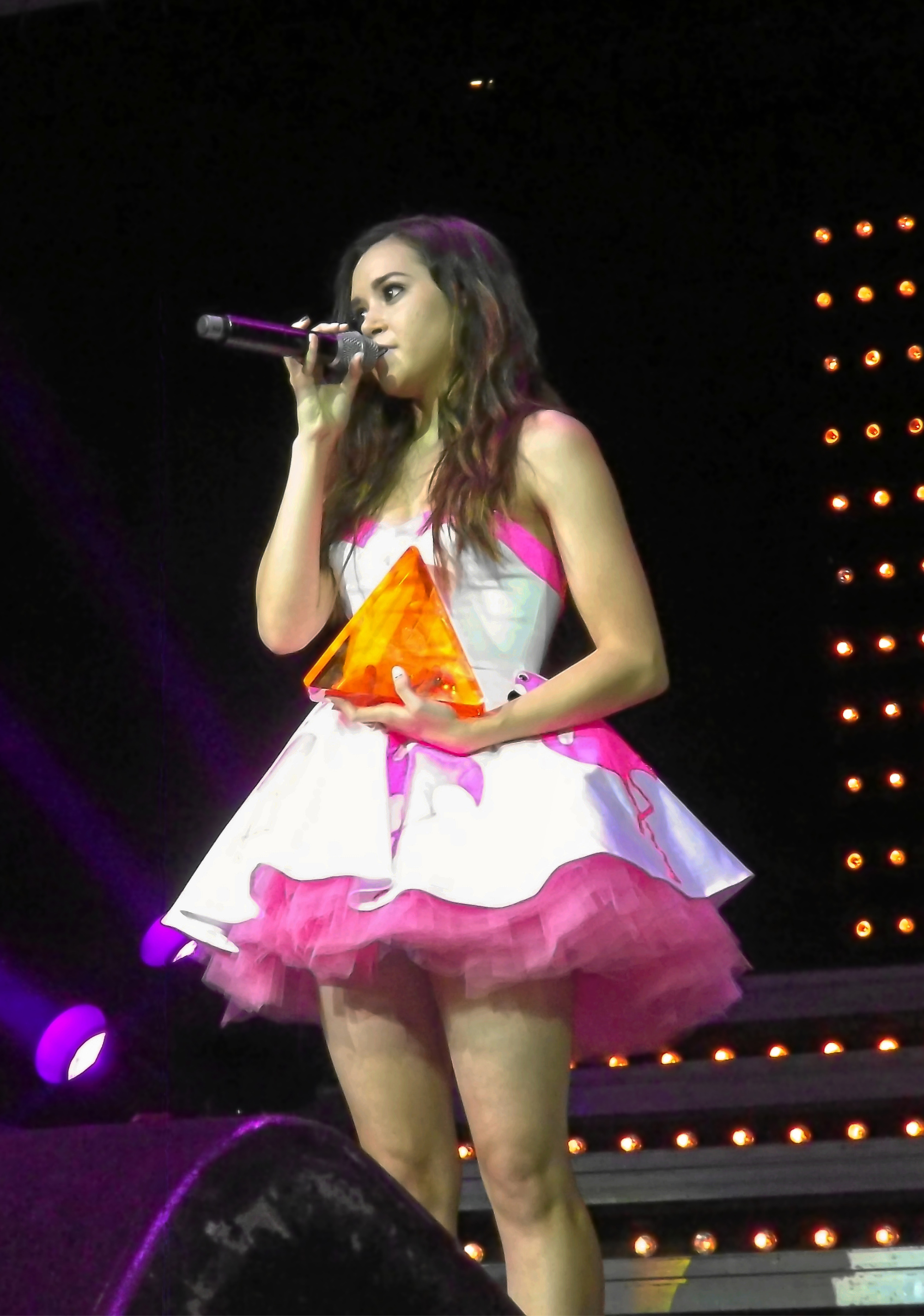 Megan Nicole mit einem Playaward bei den Videodays